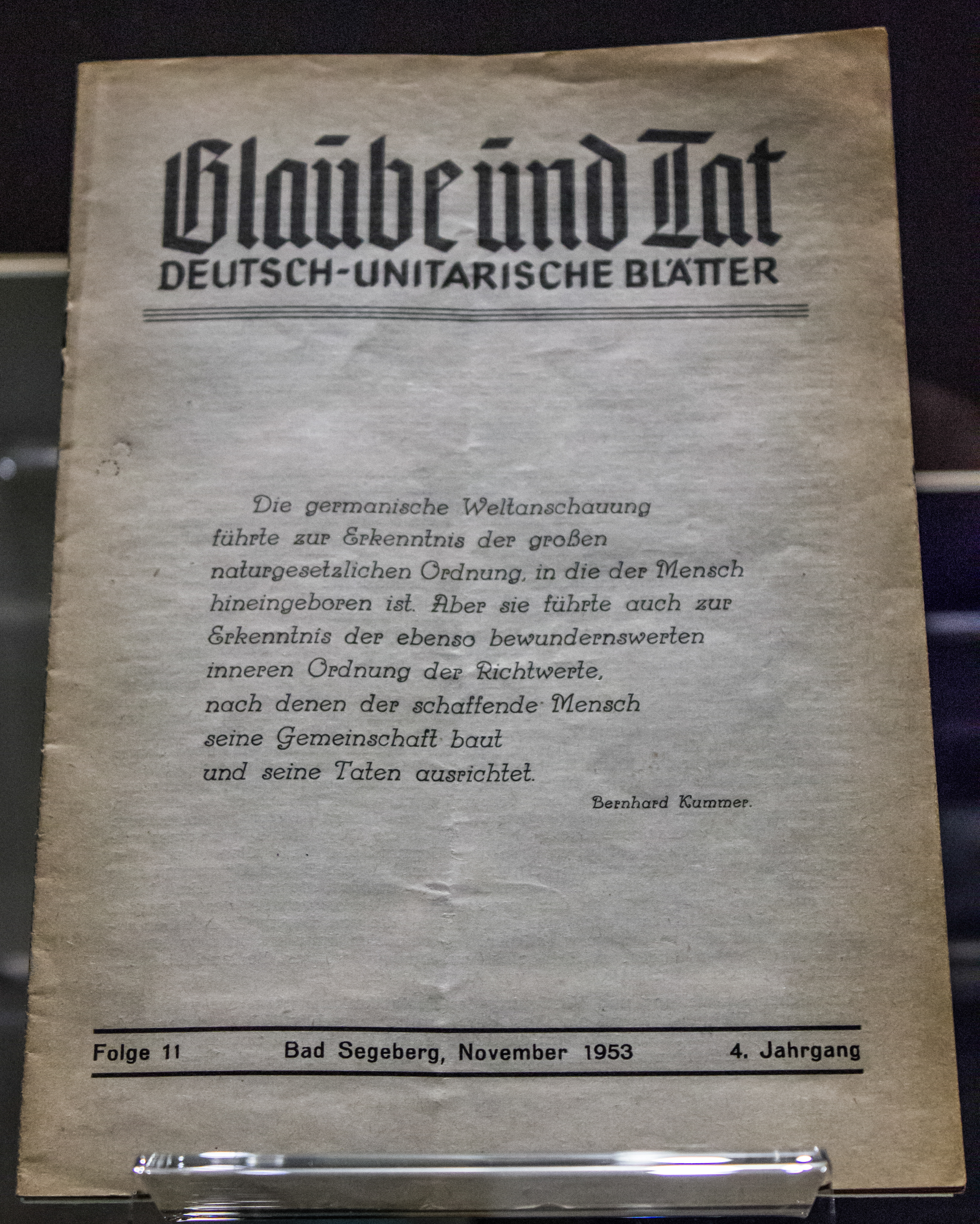 Titelseite der Publikation "Glaube und Tat" der Deutschen Unitarischen Religionsgemeinschaft mit Gedicht zur "germanischen Weltanschauung" von Bernhard Kummer